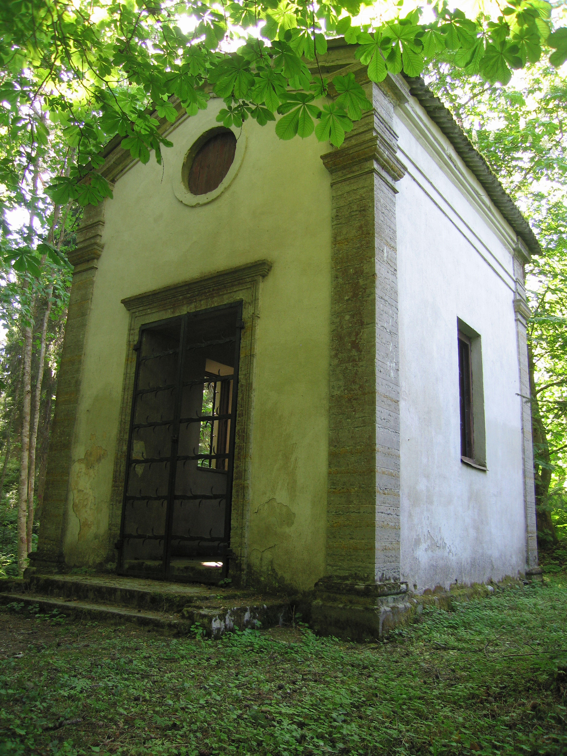 Kalmistu kabel